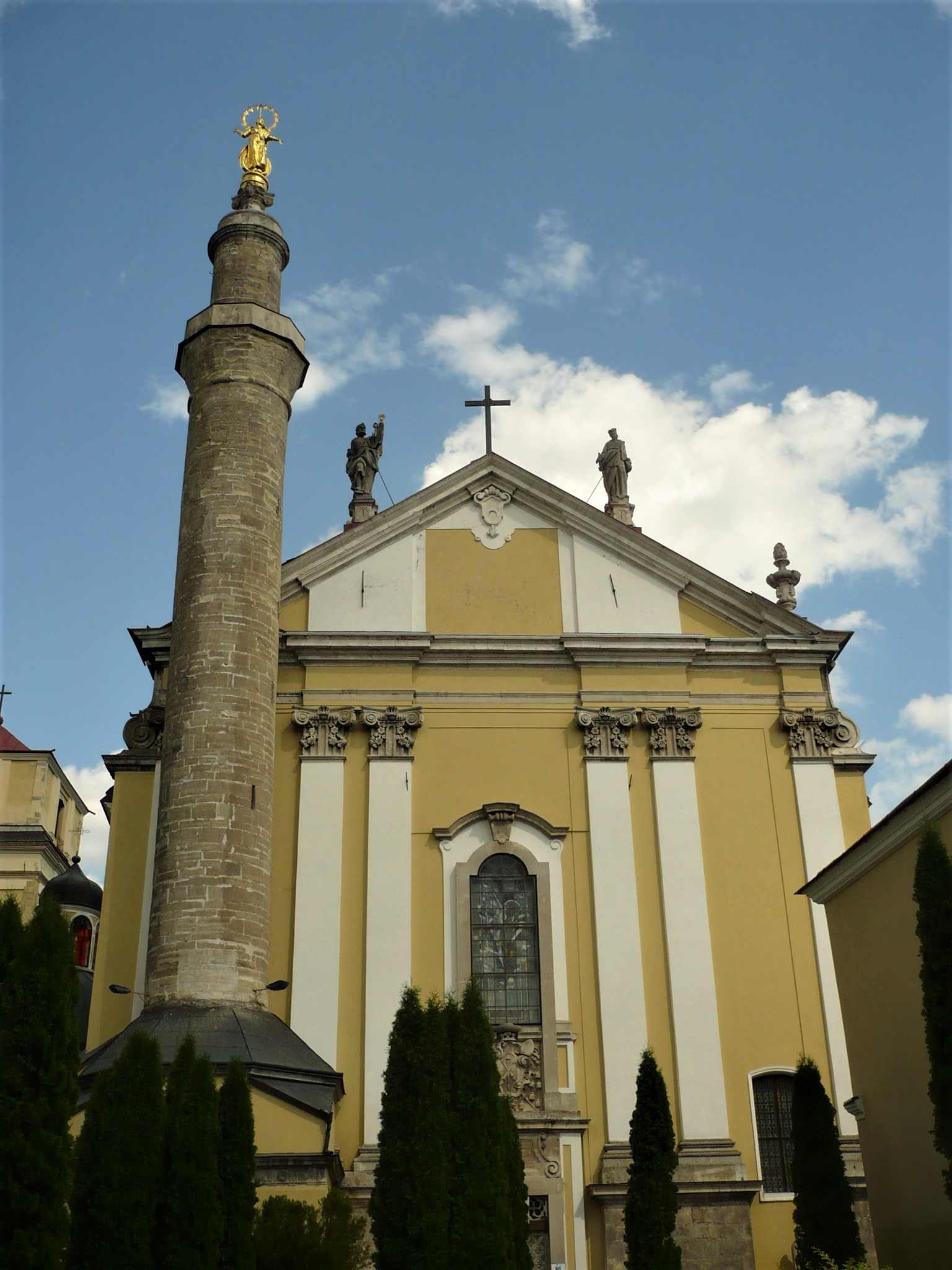 Kamieniec Podolski. Katedra rzymskokatolicka pw. śś. Piotra i Pawła